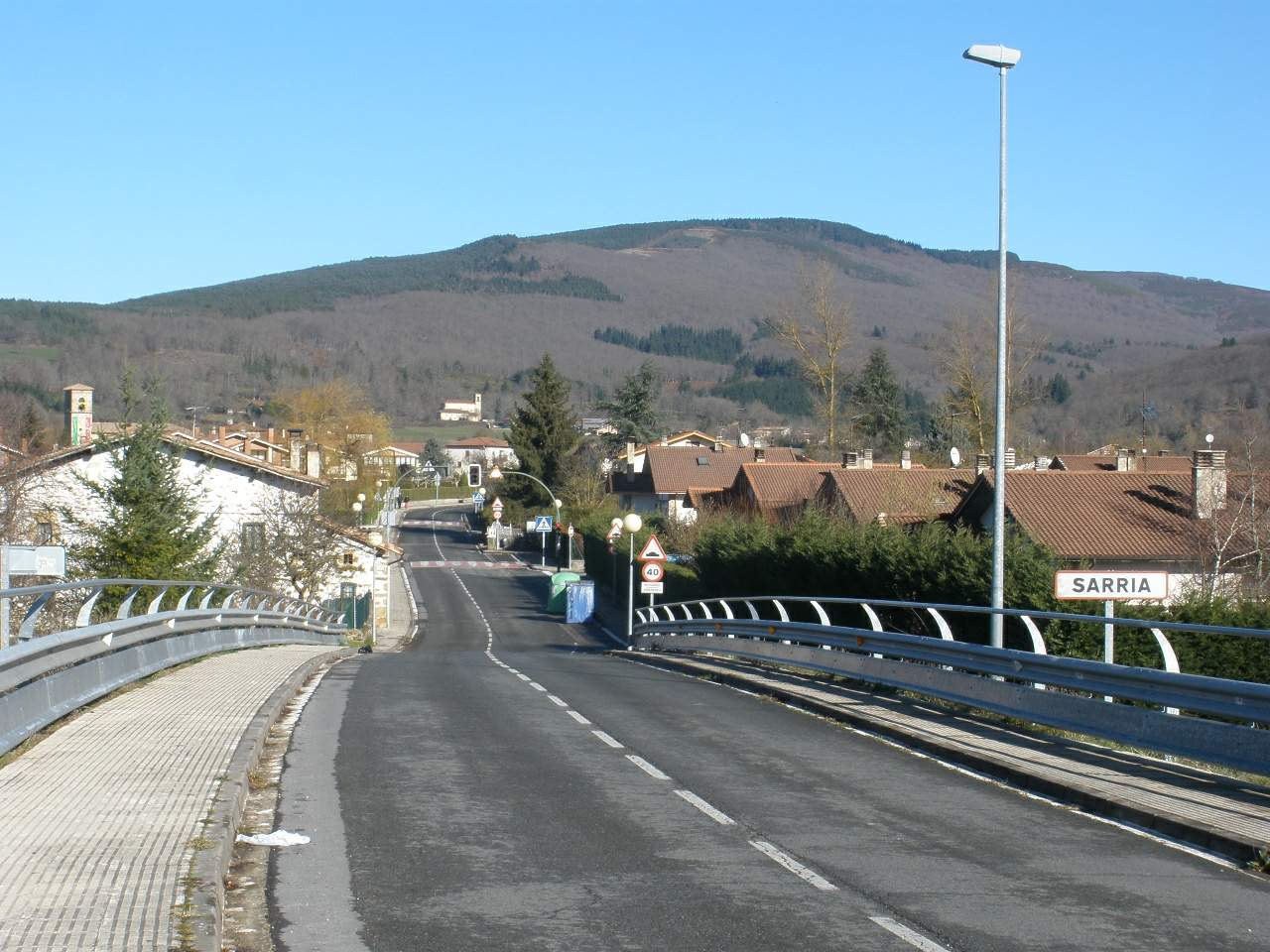 Sarría (Zuia, Álava)